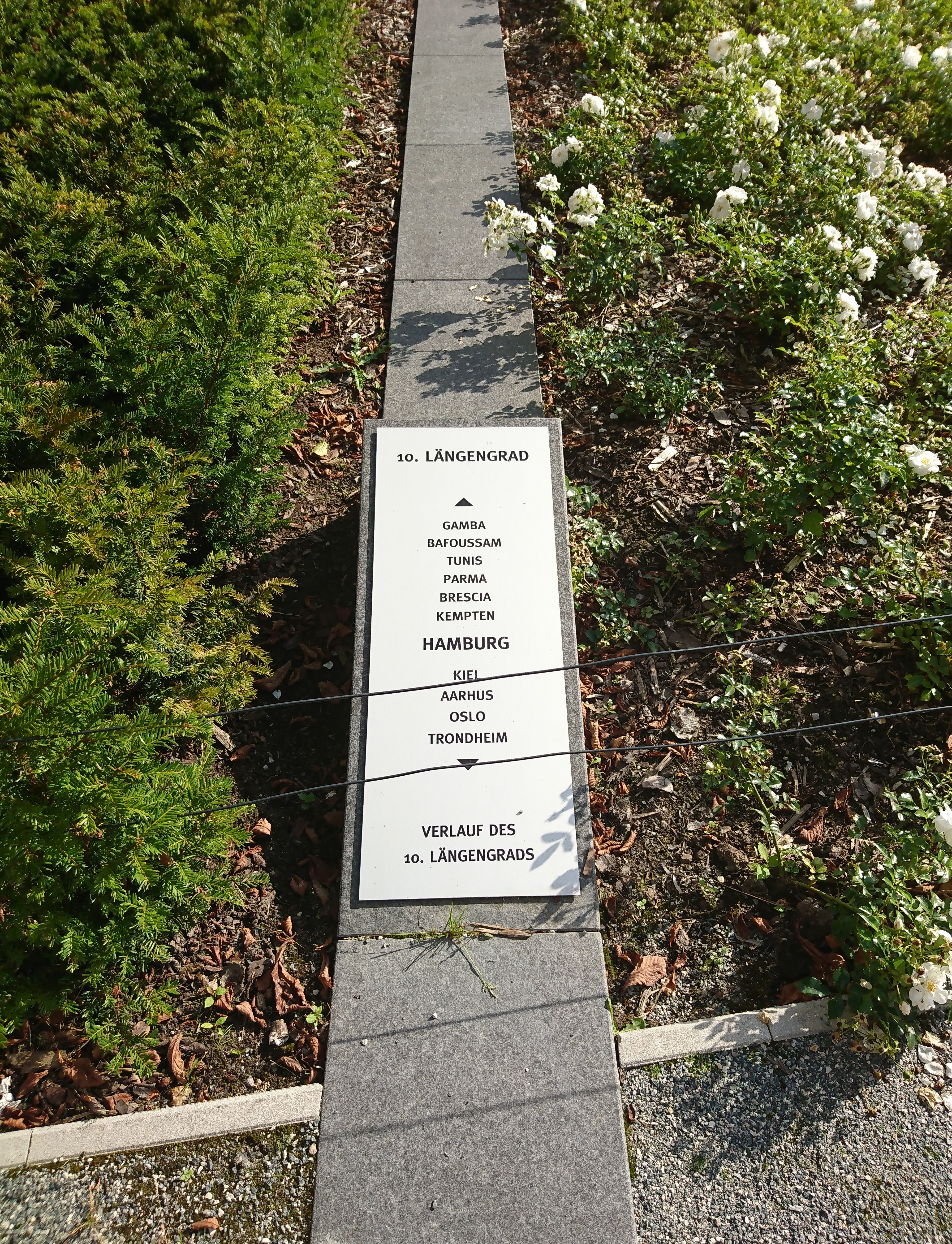 Markierung des 10. Längengrades (Meridian) östlicher Länge (10° Ost) auf dem Käkenhof aus dem Jahre 2015, Hamburg-Langenhorn. Nördliche Tafel 1, Blickrichtung Süden